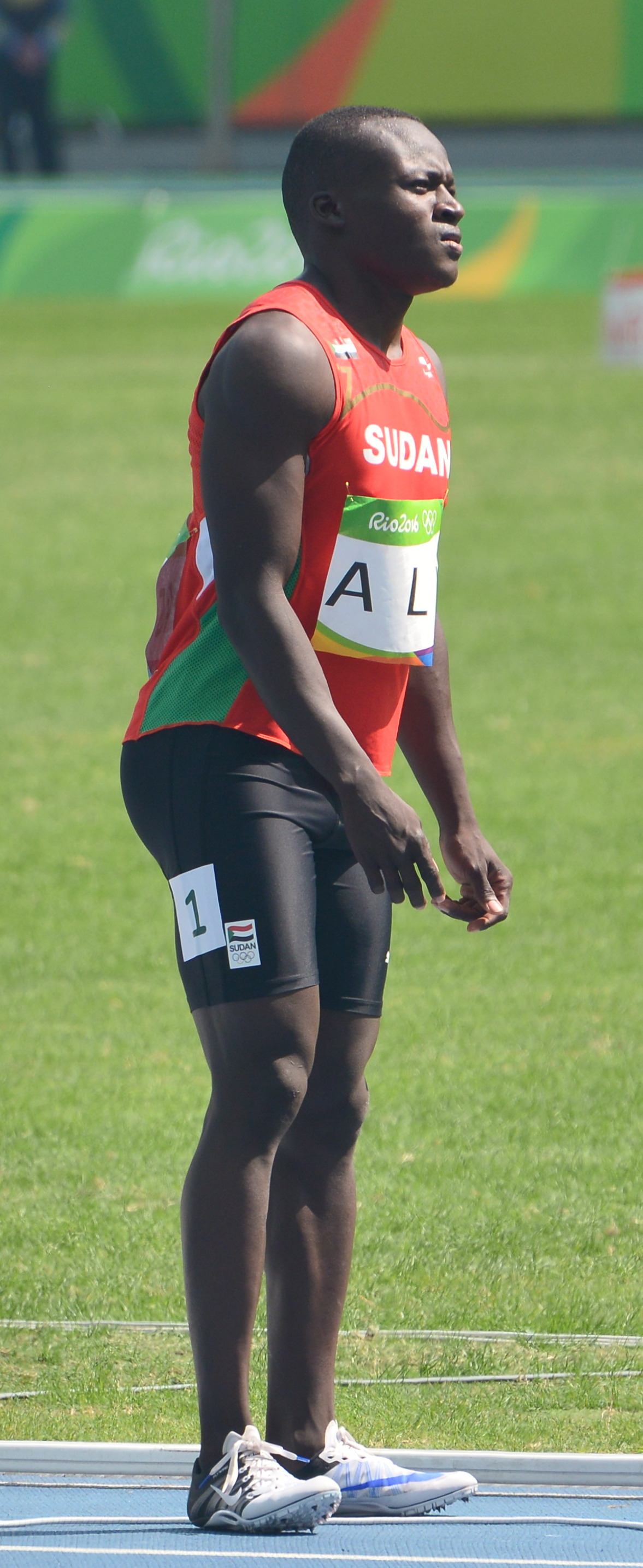 Séries du 200m Homme aux JO de Rio 2016